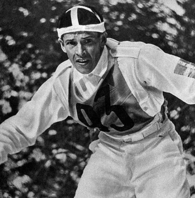 Garmisch-Partenkirchen 1936, 18 km, Erik August Larsson (SWE) 1e.